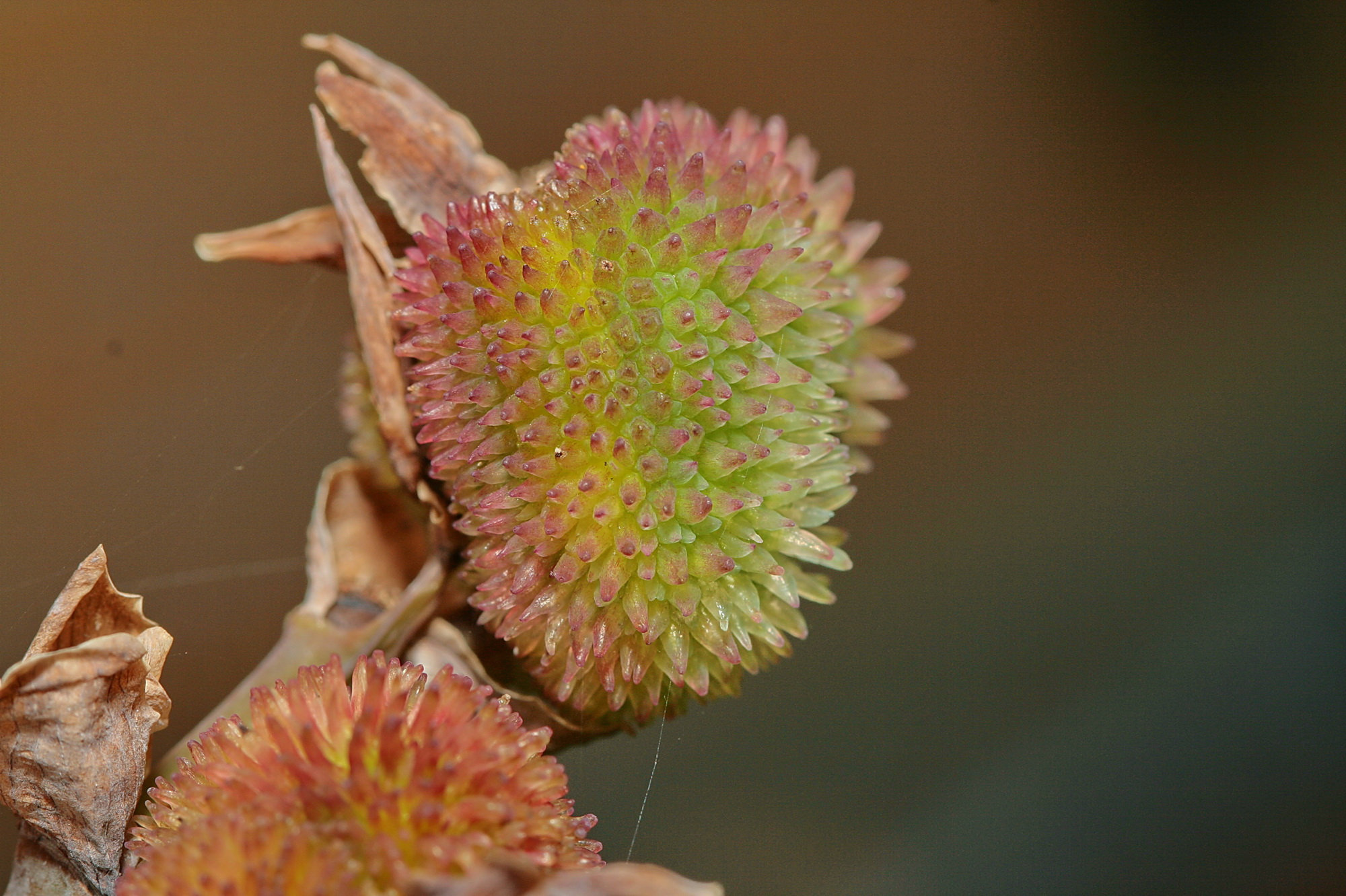 Frucht des Indischen Blumenrohr in Isernhagen, Niedersachsen, Deutschland